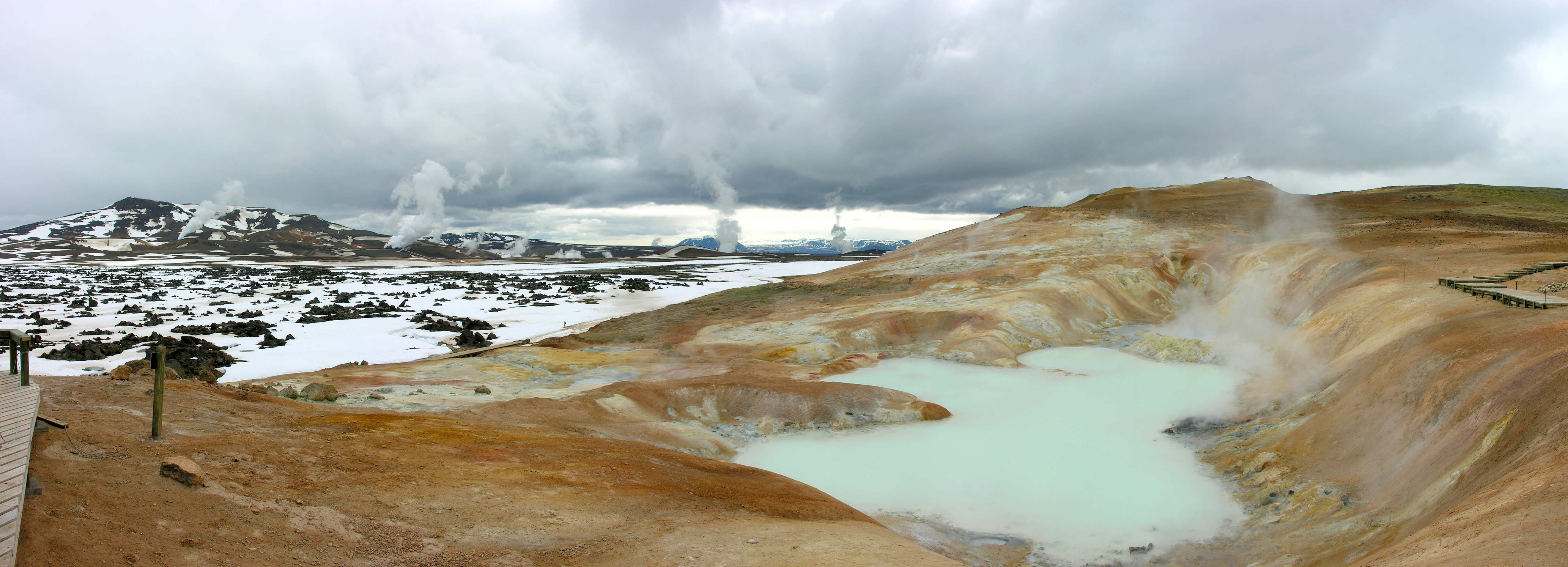 Iceland, Krafla seen from Leirhnjúkur